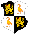 Wapen Reuss jongere linie